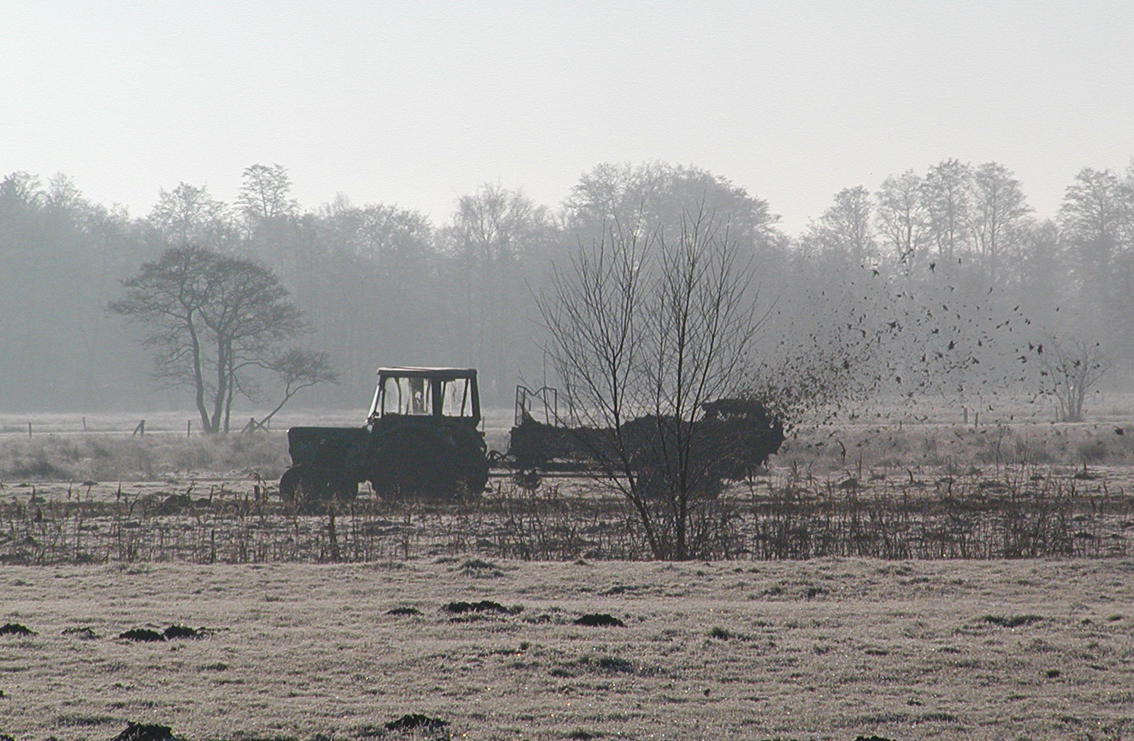 Ein Bauer beim Mist fahren im Moor bei Oppeln, da der Boden gefroren ist, muß der Bauer auch am Sonntag nach der Kirche fahren